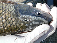 Laichausschlag am männlichen Individuum